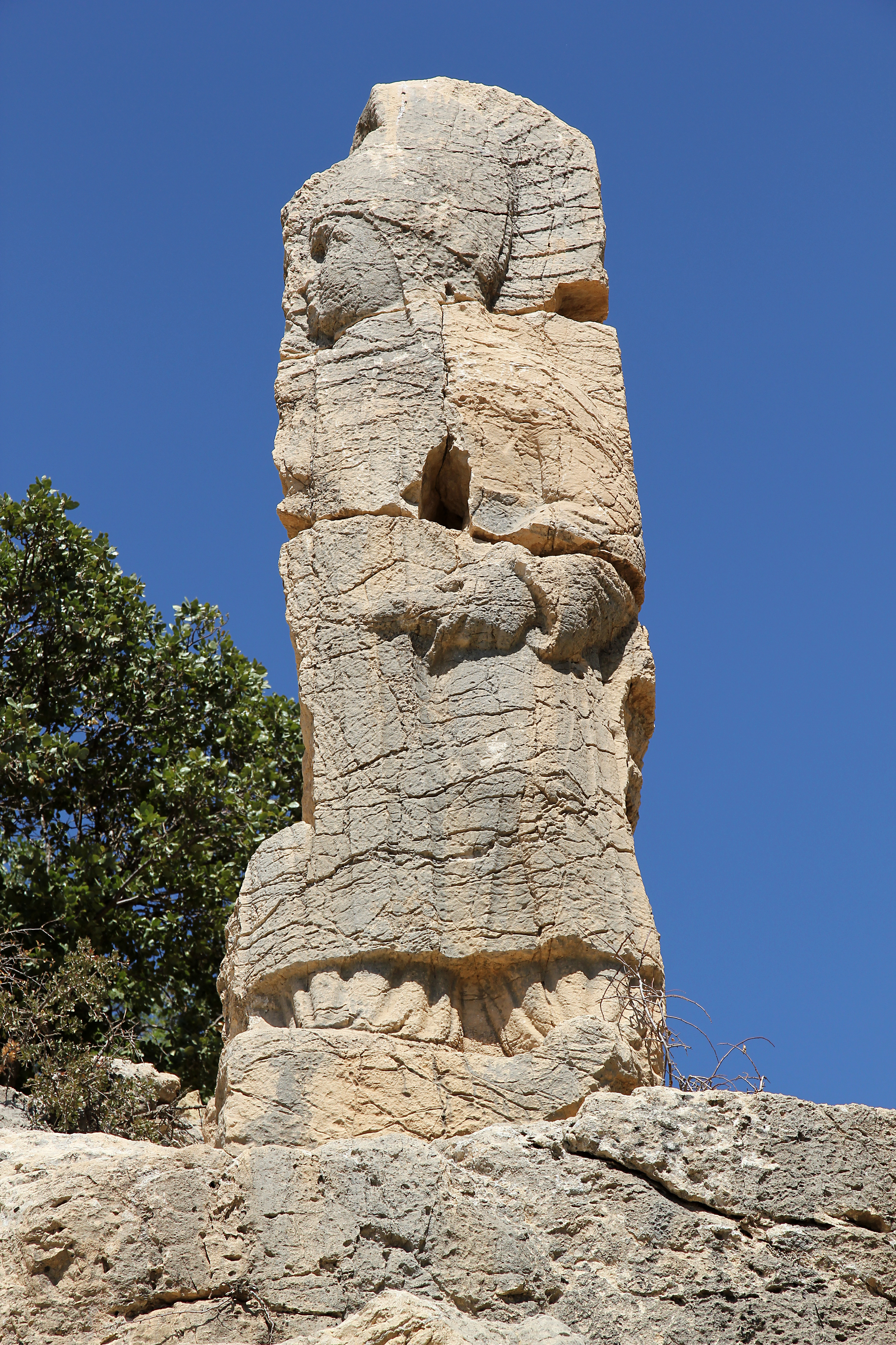 Rechte Hälfte eines Dexiosis-Relief aus Arsameia am Nymphaios, Türkei, beim Nemrut Dag, Mithras mit einem kommagenischen Herrscher